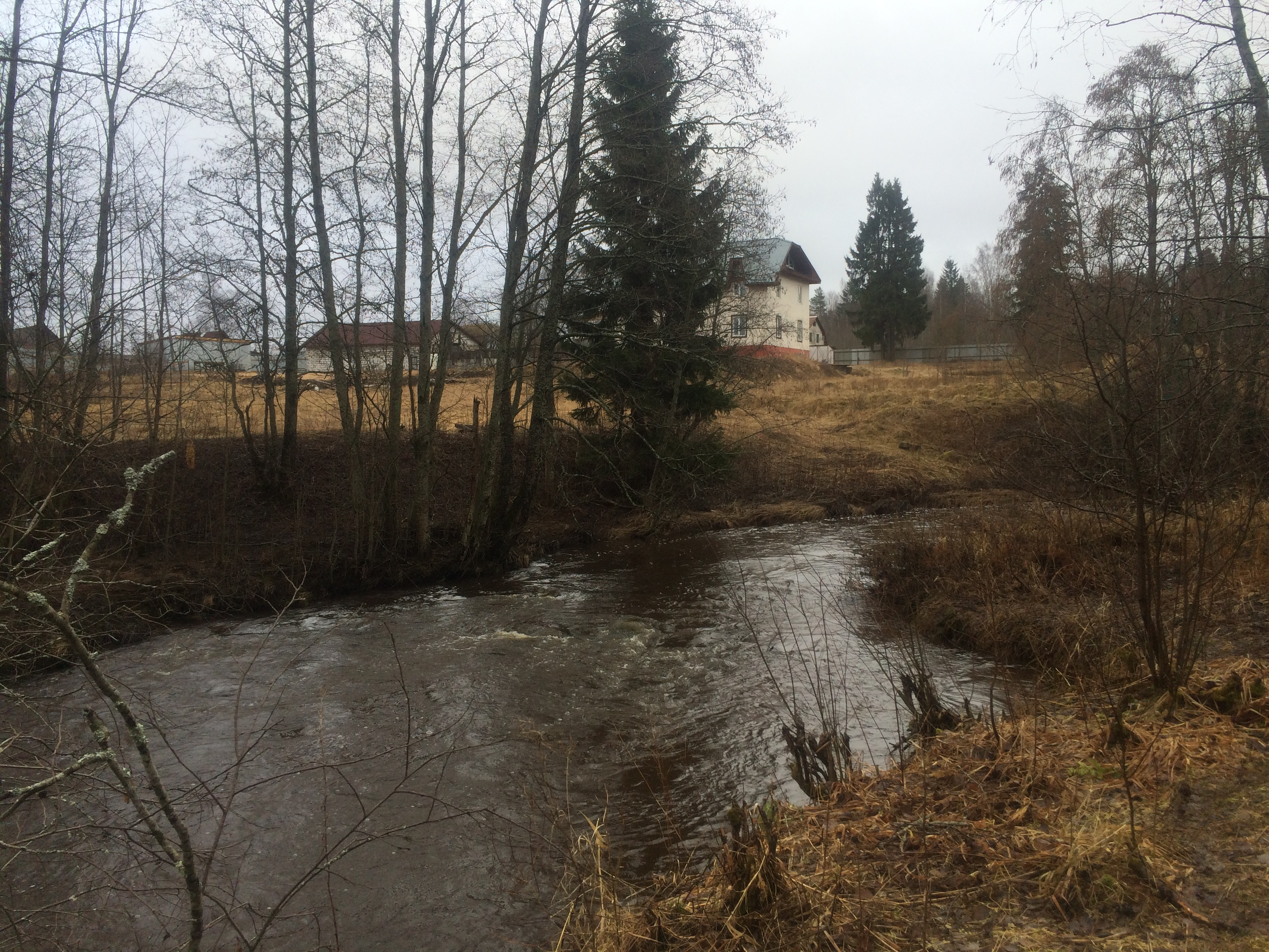 Авлога